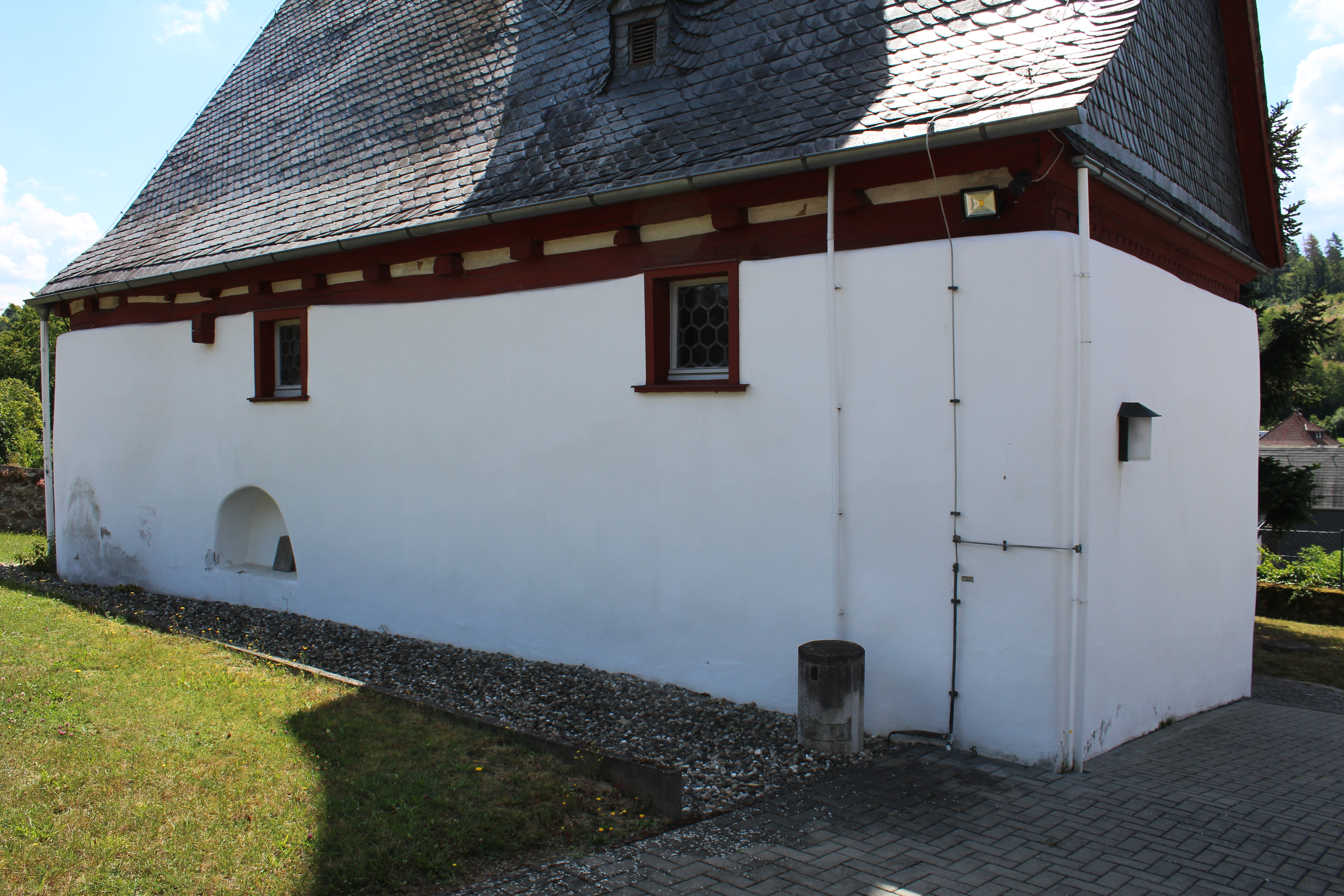 Evangelische Kirche Niederquembach, Gemeinde Schöffengrund, Hessen, Deutschland